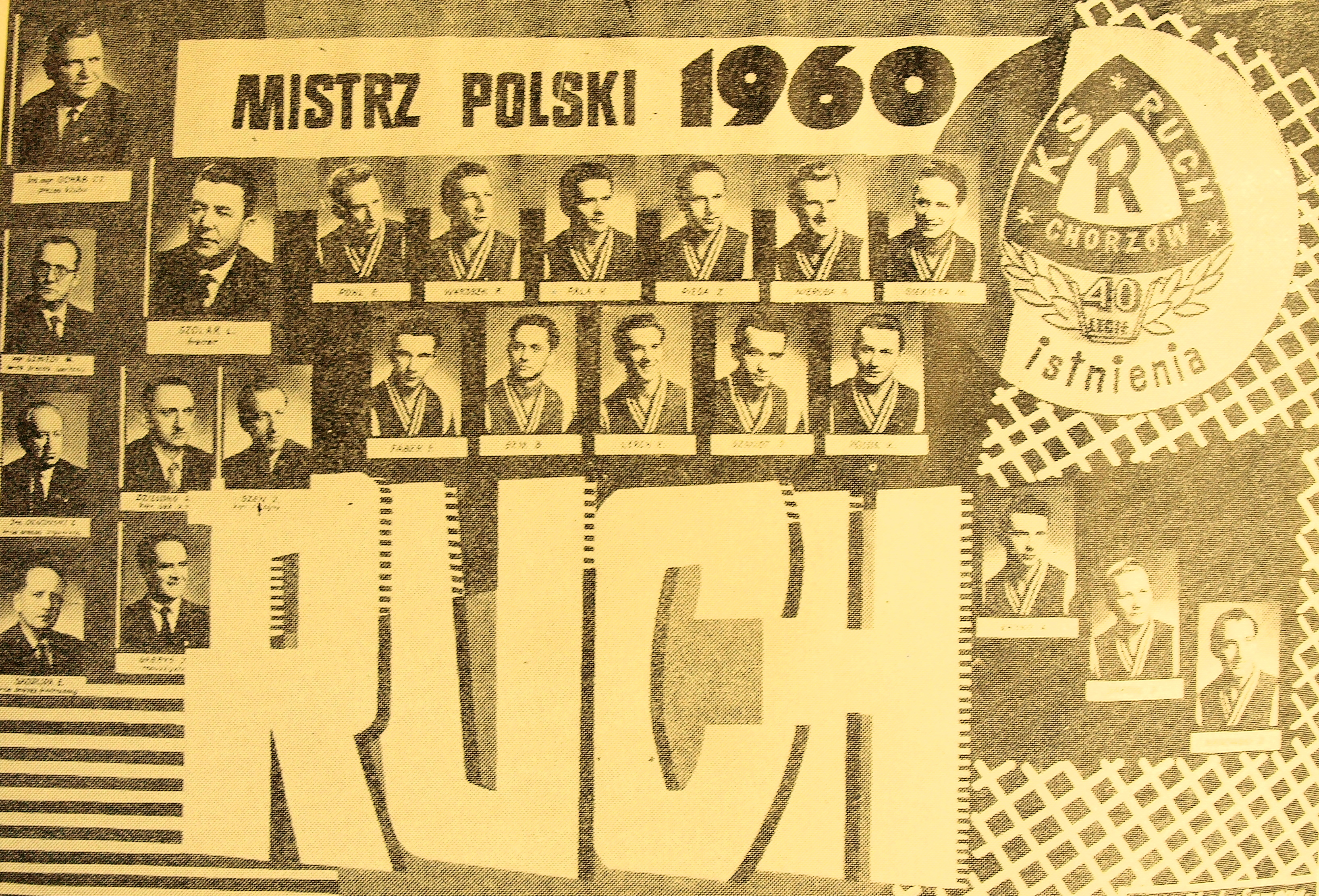 Ruch Chorzów - mistrzowie Polski 1960